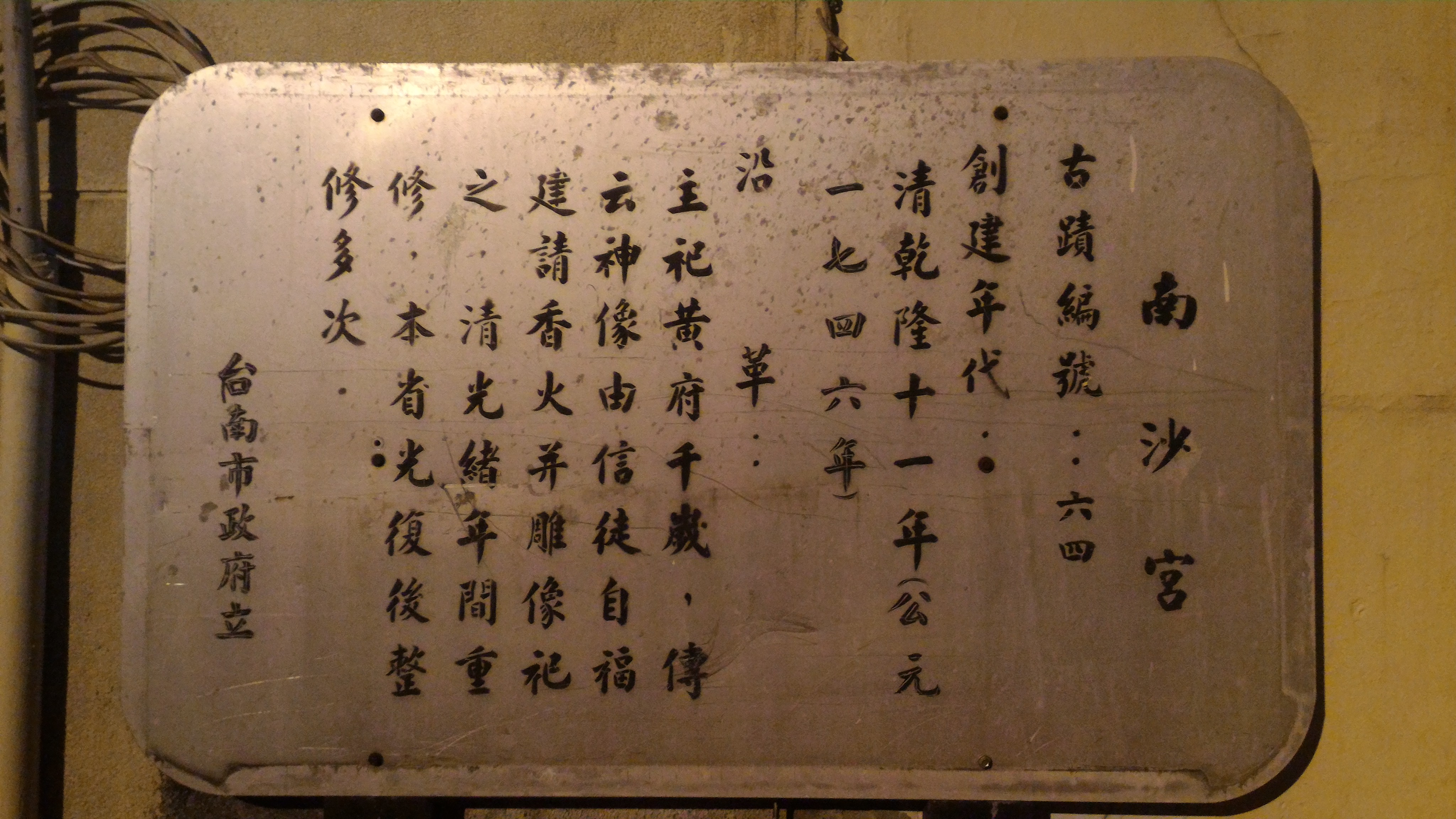 臺南南沙宮 古蹟編號